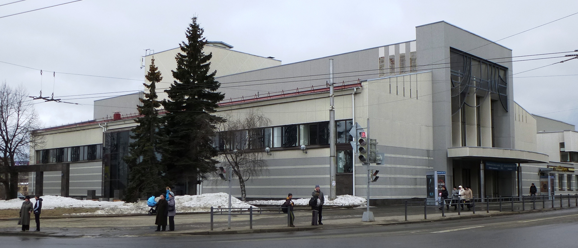 Здание Национального театра Республики Карелии в Петрозаводске